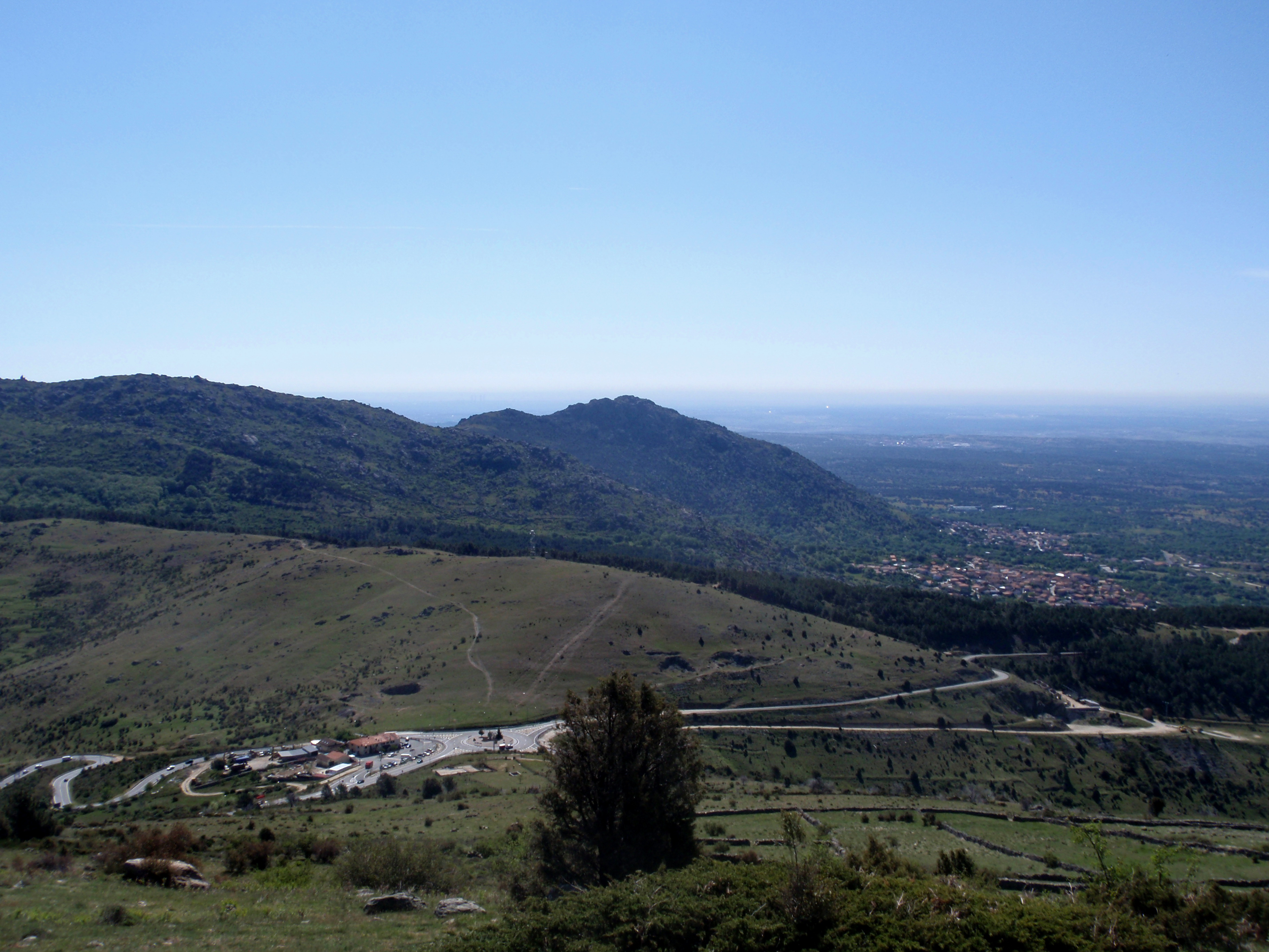 Vista panorámica del puerto de la Cruz Verde situado a 1.256 m de altitud, entre los municipios de San Lorenzo de El Escorial y Robledo de Chavela (Comunidad de Madrid, España).